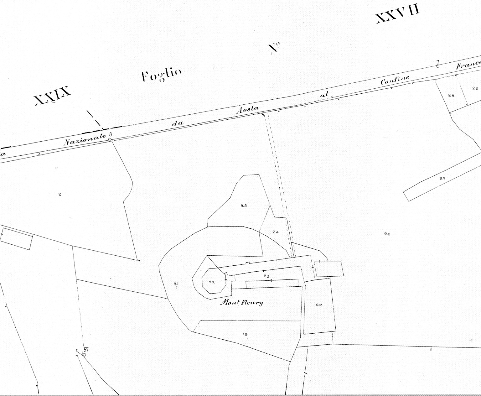 Dettaglio della mappa del Catasto d'impianto della Città di Aosta del 1890 circa, foglio 31, scala 1:1.000. Castello di Montfleury, Aosta, Valle d'Aosta, Italia. Proprietà: Ufficio del Territorio, Sezione Catasto Terreni, Aosta.